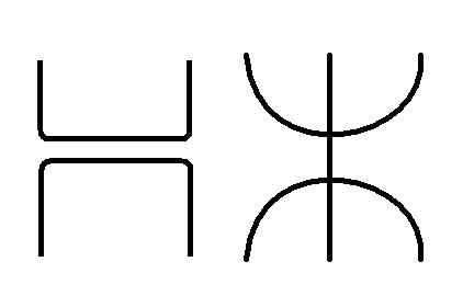 Tifnagh letter, berber (Amazigh) alphabet.